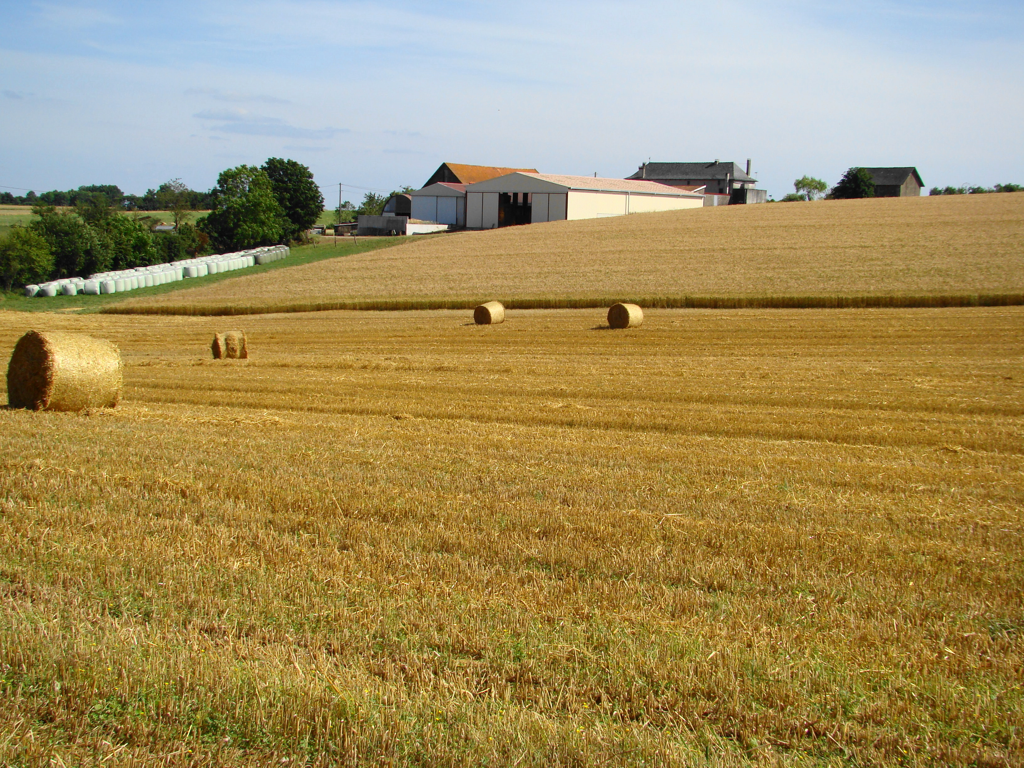 Montirat : une exploitation agricole, lieu-dit La Coutounié.